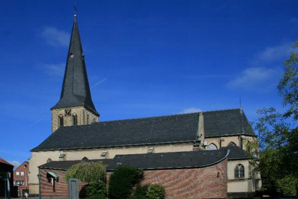 Denkmal Nr. 20 in Grefrath